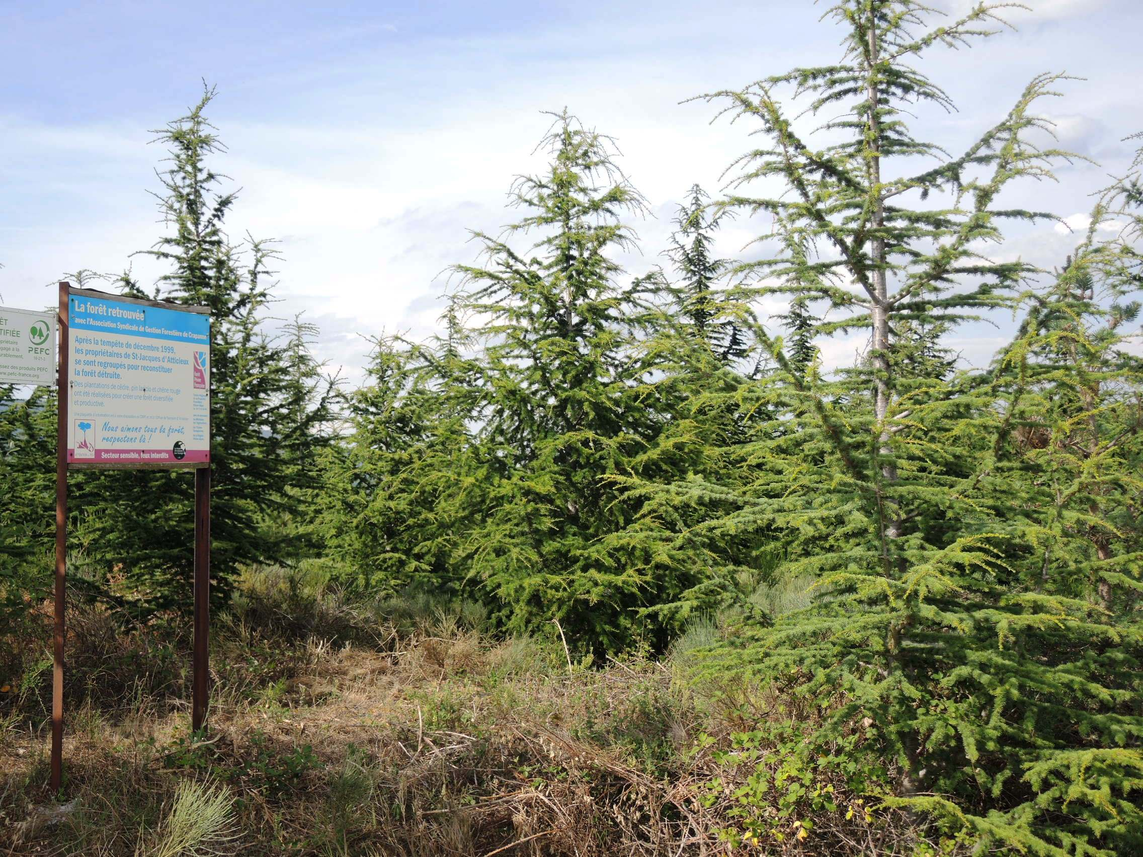 Saint-Jacques-d'Atticieux détail